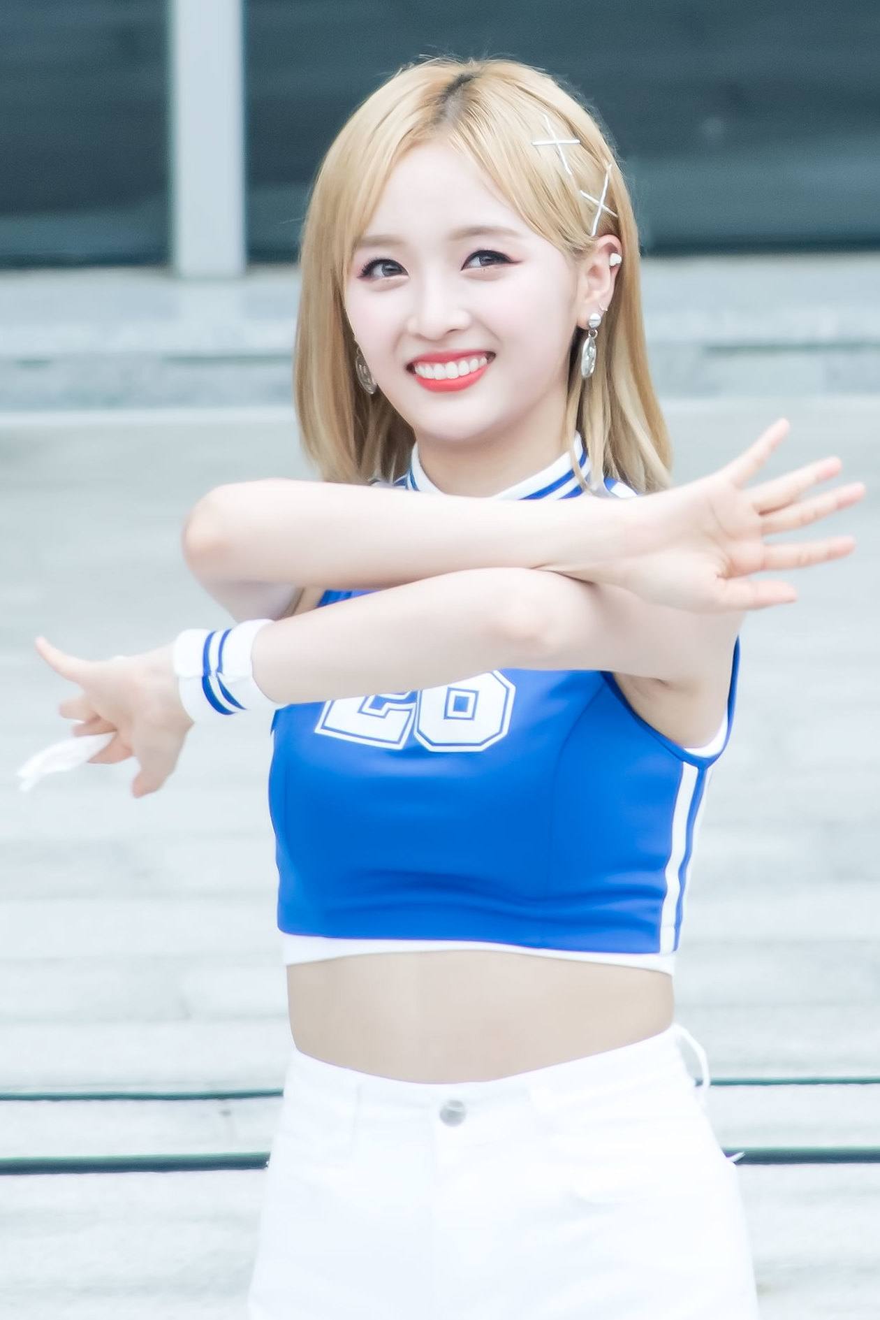 170716 우주소녀 게릴라 콘서트 수서SRT